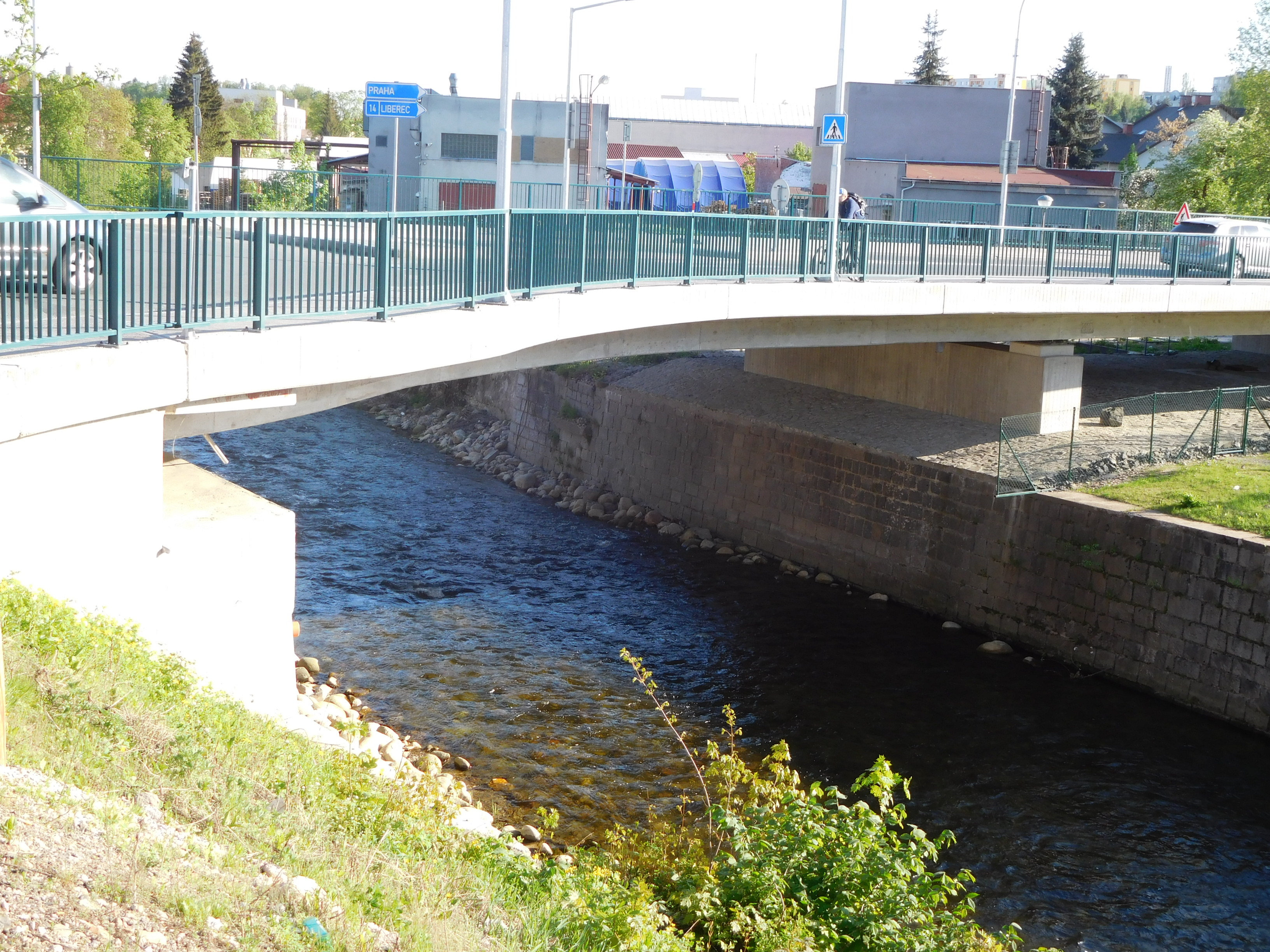 Vrchlabí - most přes Labe mezi ulicemi Tyršova a Nádražní